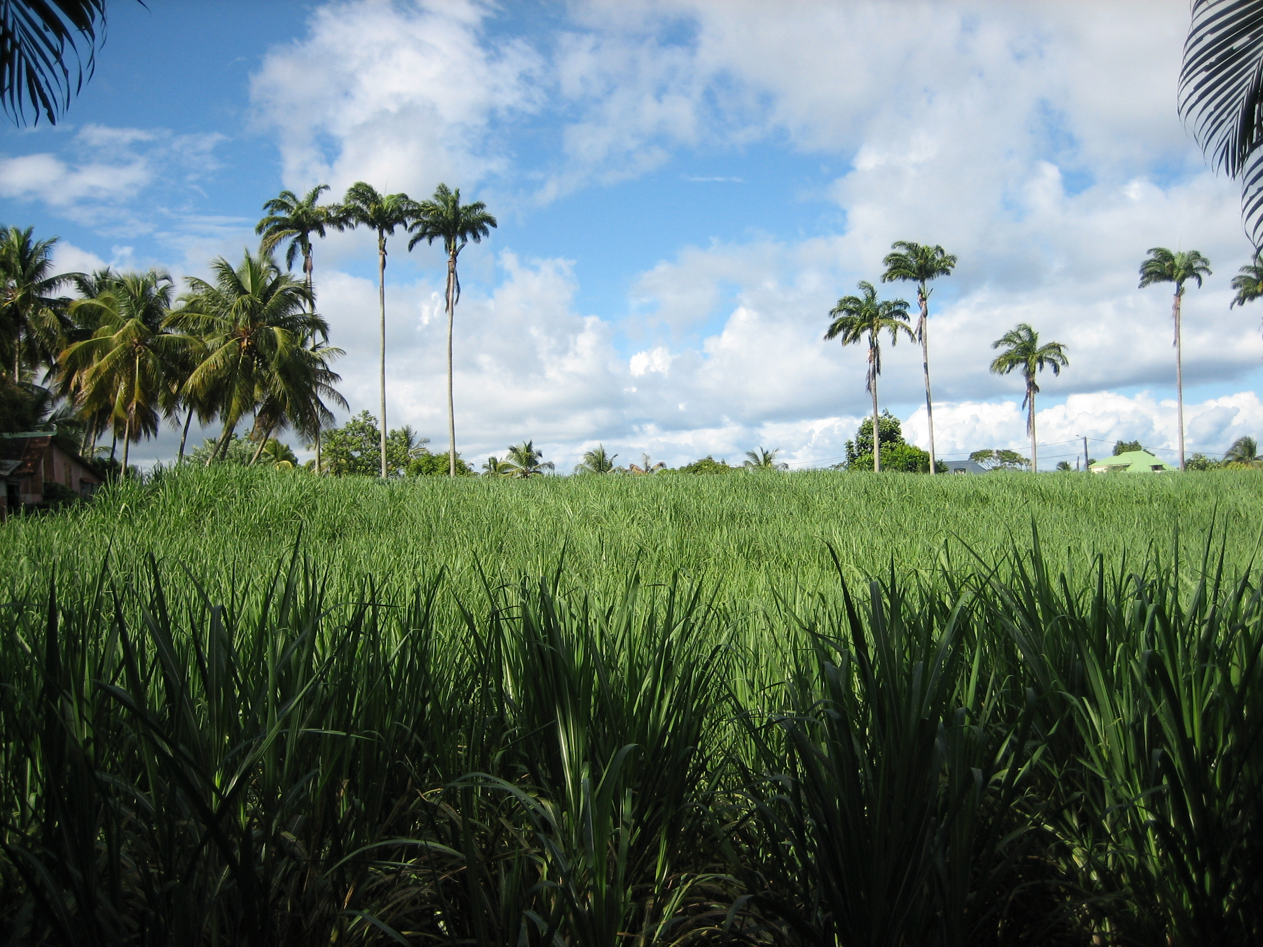 Champ de cannes à sucre, basse-terre